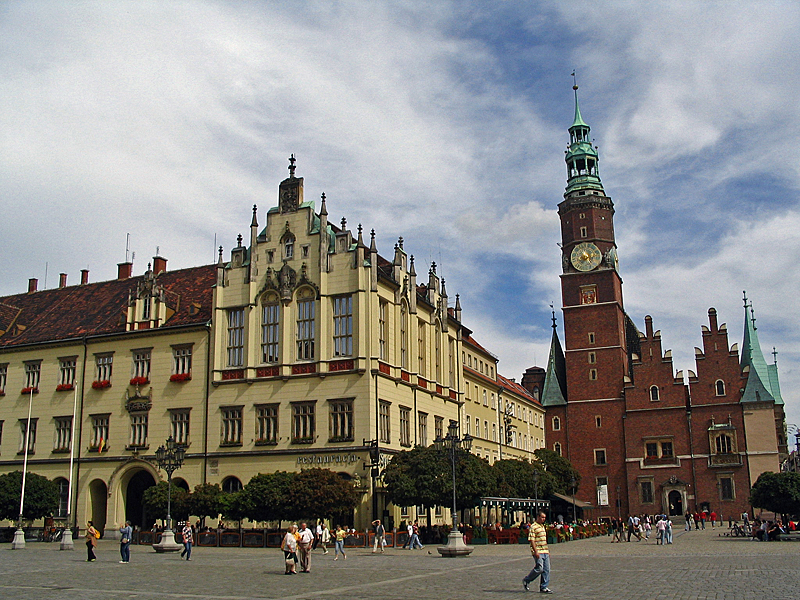 Rynek we Wrocławiu.